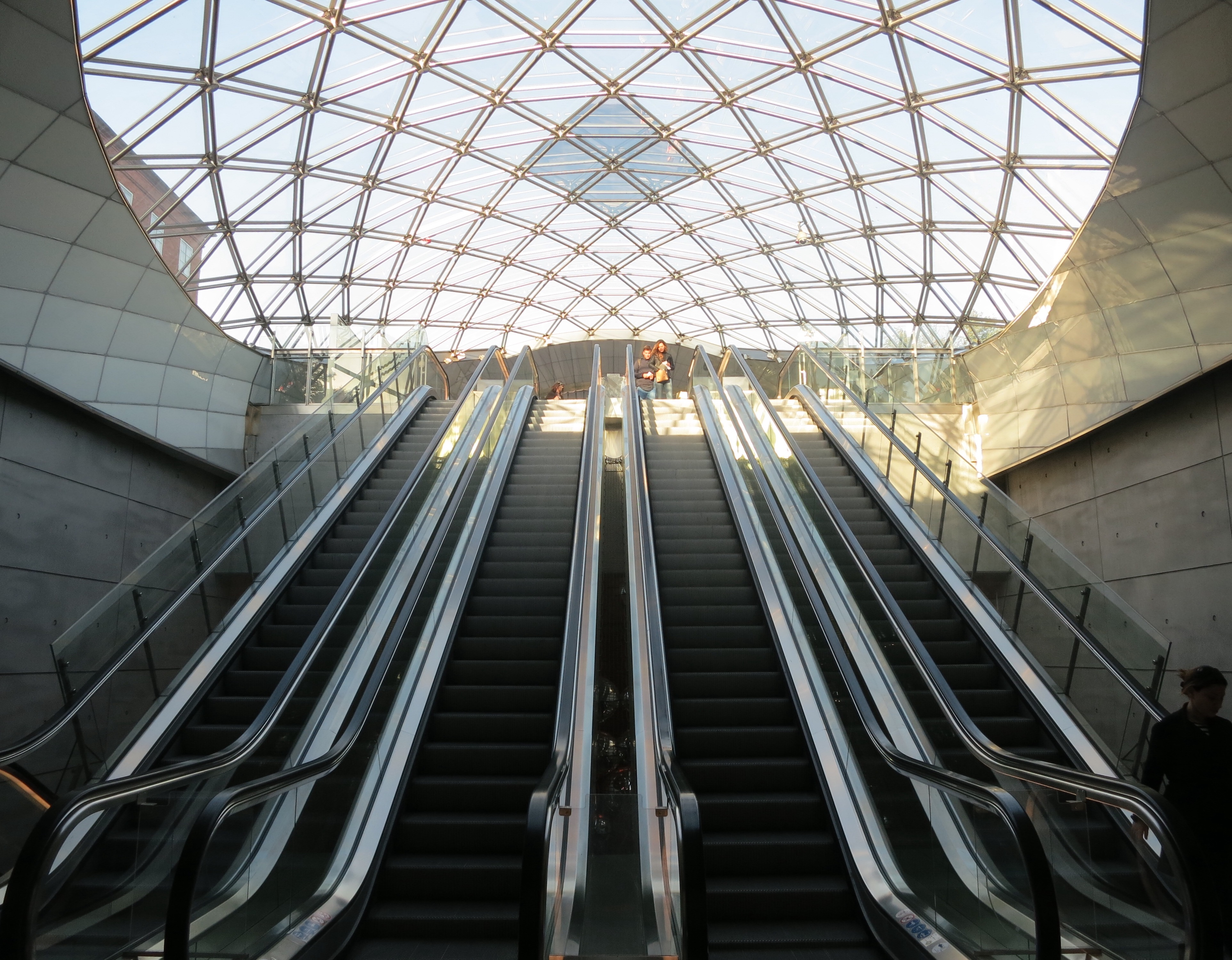 Triangelns station, södra uppgången, rulltrappor